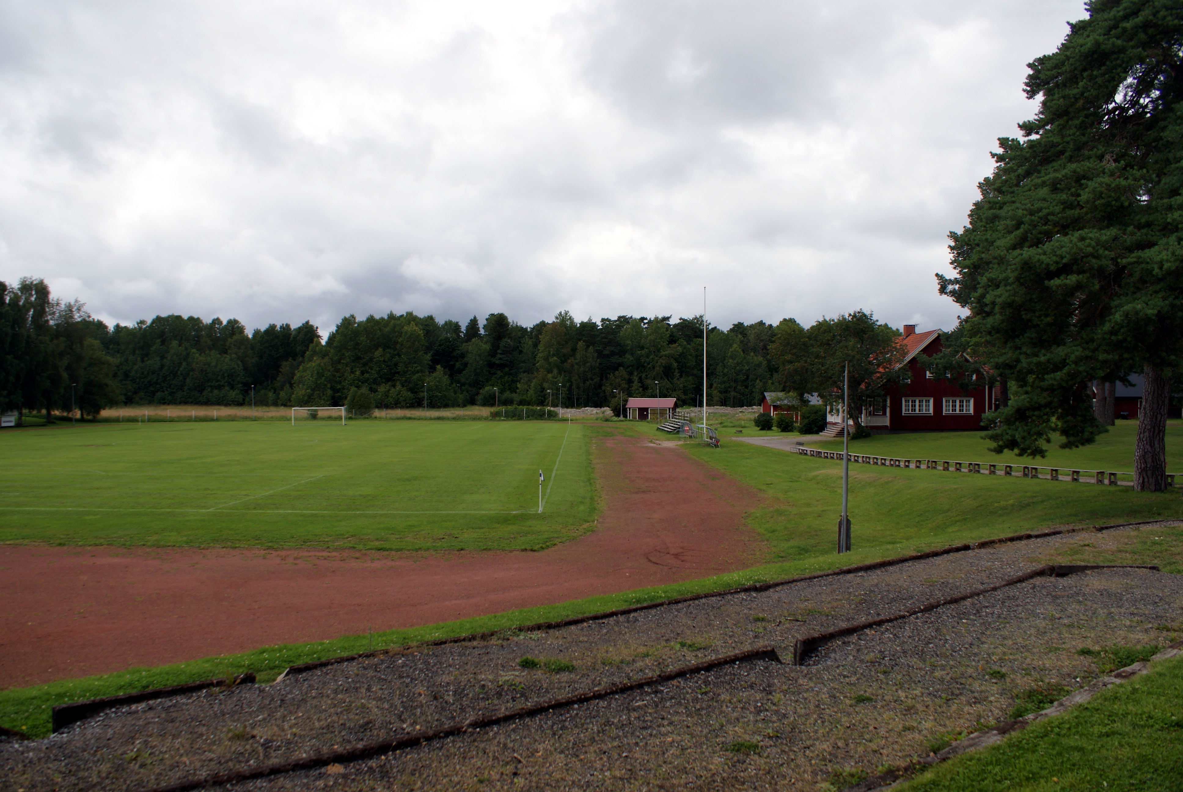 Fotbollsplanen på Gimo IP. Det röda huset till höger är klubbhus för Gimo IF.